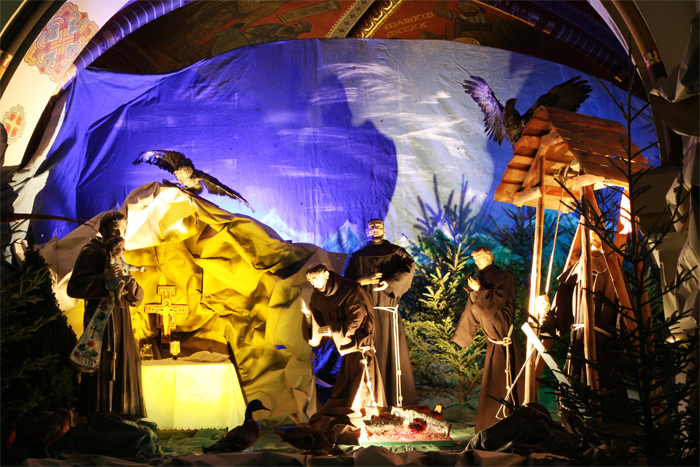 Crib in Katowice Panewniki, Poland (2010)